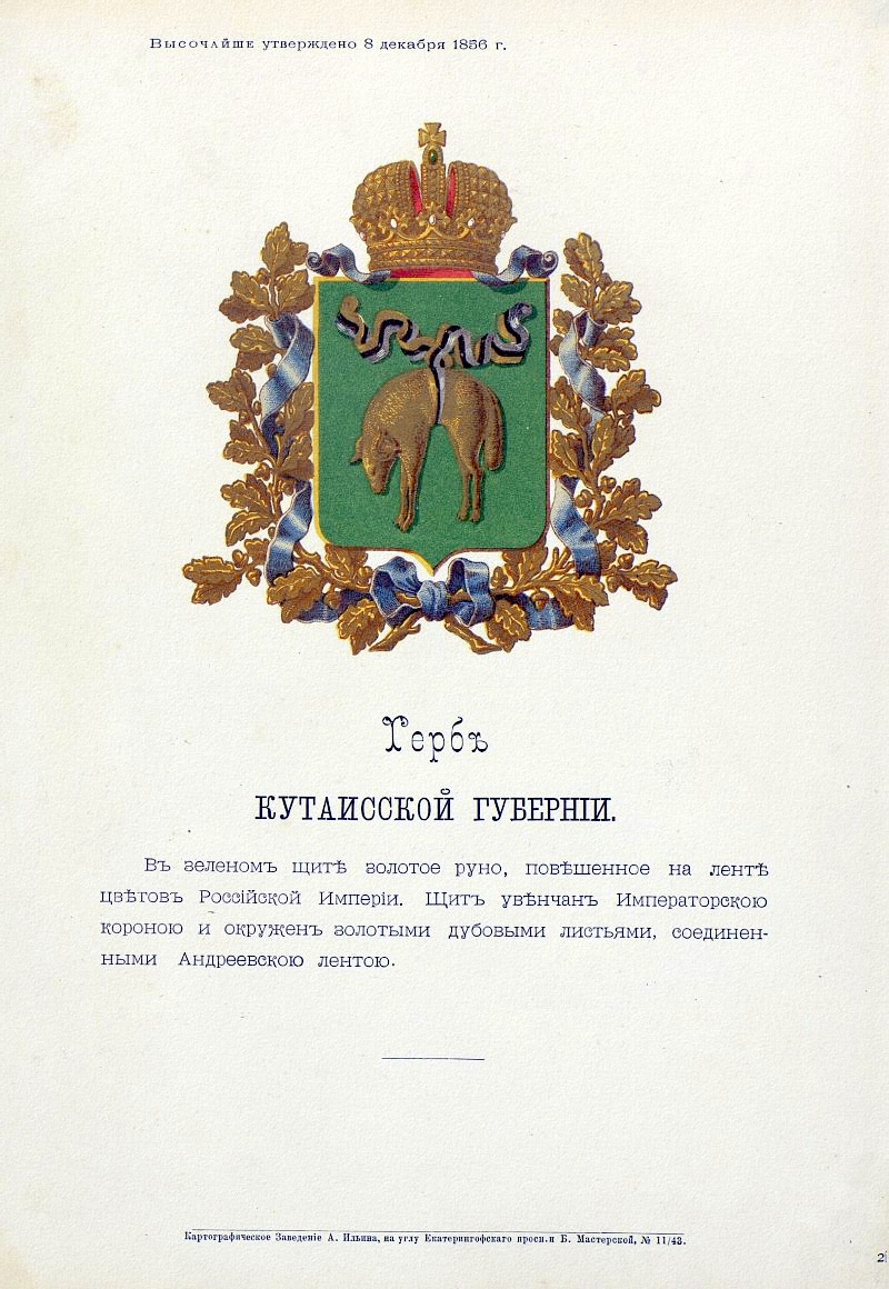 Official Russian Empire coat of arms Kutais Governorate. Герб Российской Империи Кутаисской губернии с официальным описанием в Гербовнике Министерства внутренних дел Российской Империи. Утверждён Императором Всероссийским Александром Вторым. Гербъ КУТАИССКОЙ ГУВЕРНIИ ВЫСОЧАЙШЕ утверждено 8 декабря 1856 г. Въ зеленомъ щите золотое руно, повешенное на ленте цветовъ Россійской Имперіи. Щитъ увенчанъ Императорскою короною и окруженъ золотыми дубовыми листьями, соединенными Андреевскою лентою.